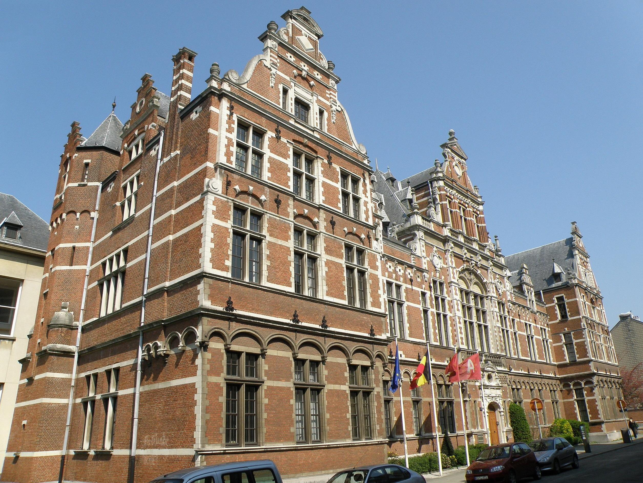 Antwerpen (district Antwerpen). Voormalig jongensweeshuis, thans hogeschool, aan de Durletstraat te Antwerpen. Ontwerp van Leonard Blomme en broer Henri Blomme (voltooid 1881), in Vlaamse neo-renaissance. Vgl. verder Inventaris Bouwkundig Erfgoed Vlaanderen.